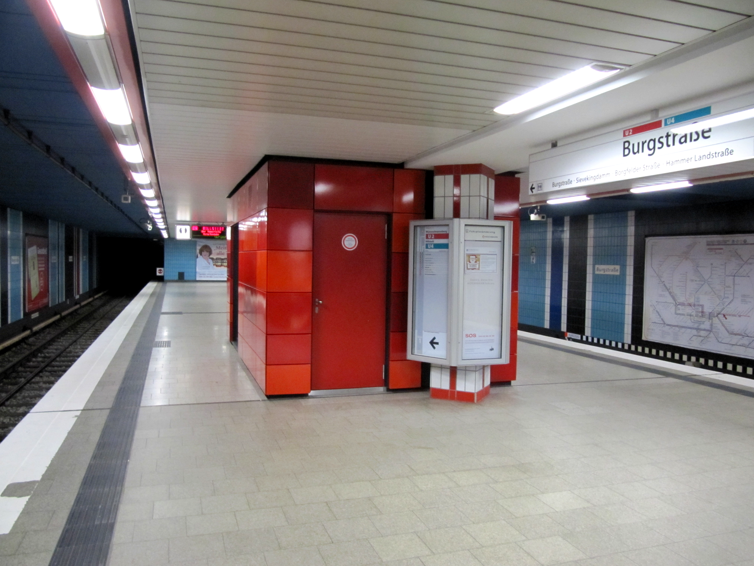 Ansicht des neuen Fahrstuhl im U-Bahnhof Burgstraße in Hamburg.